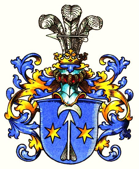 Wappen der Herren und Grafen von Garczynski, einem alten pommerellischen Adelsgeschlecht.